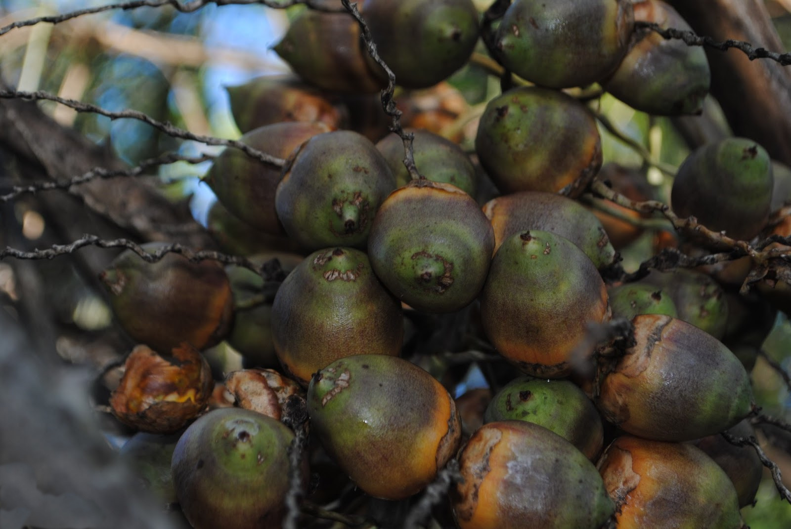 Butia yatay. Arecaceae. Fotos tomadas al márgen del Río Negro en el Cerro de la Palmera y sus alrededores, departamento de Río Negro, Uruguay.